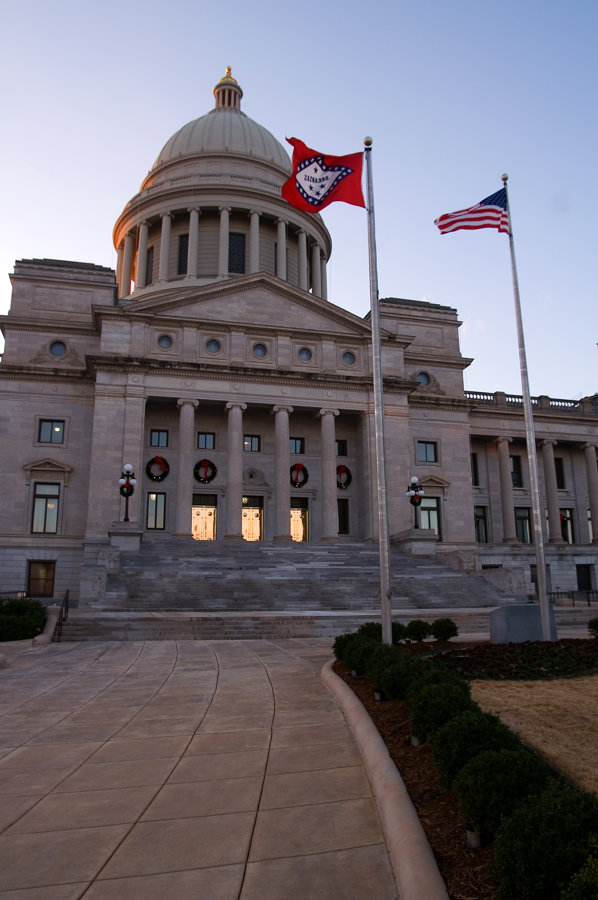 Arkansas State Capitol.